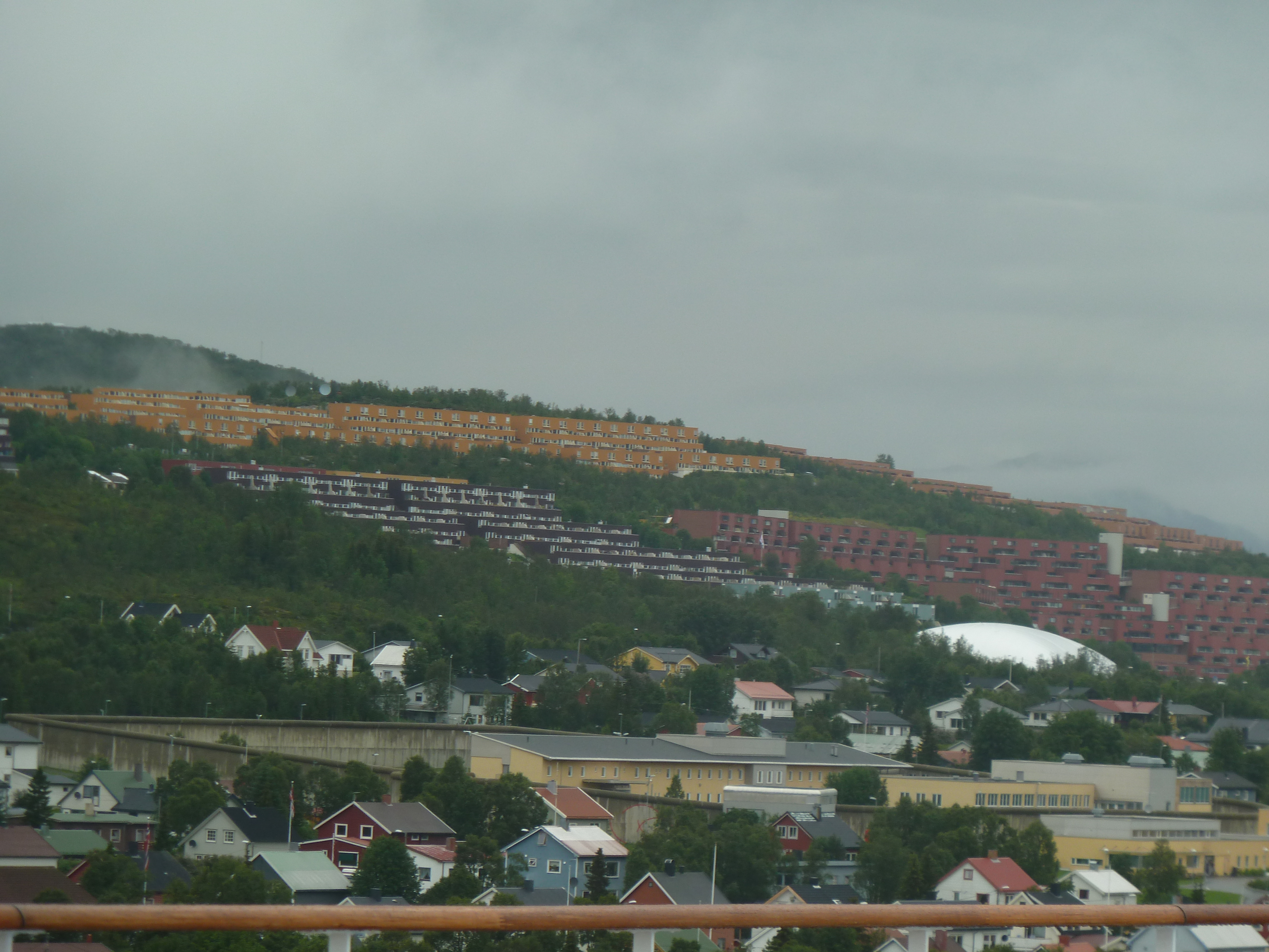 2010-08-02 - Tromsø - gegensätzliches Wohnen